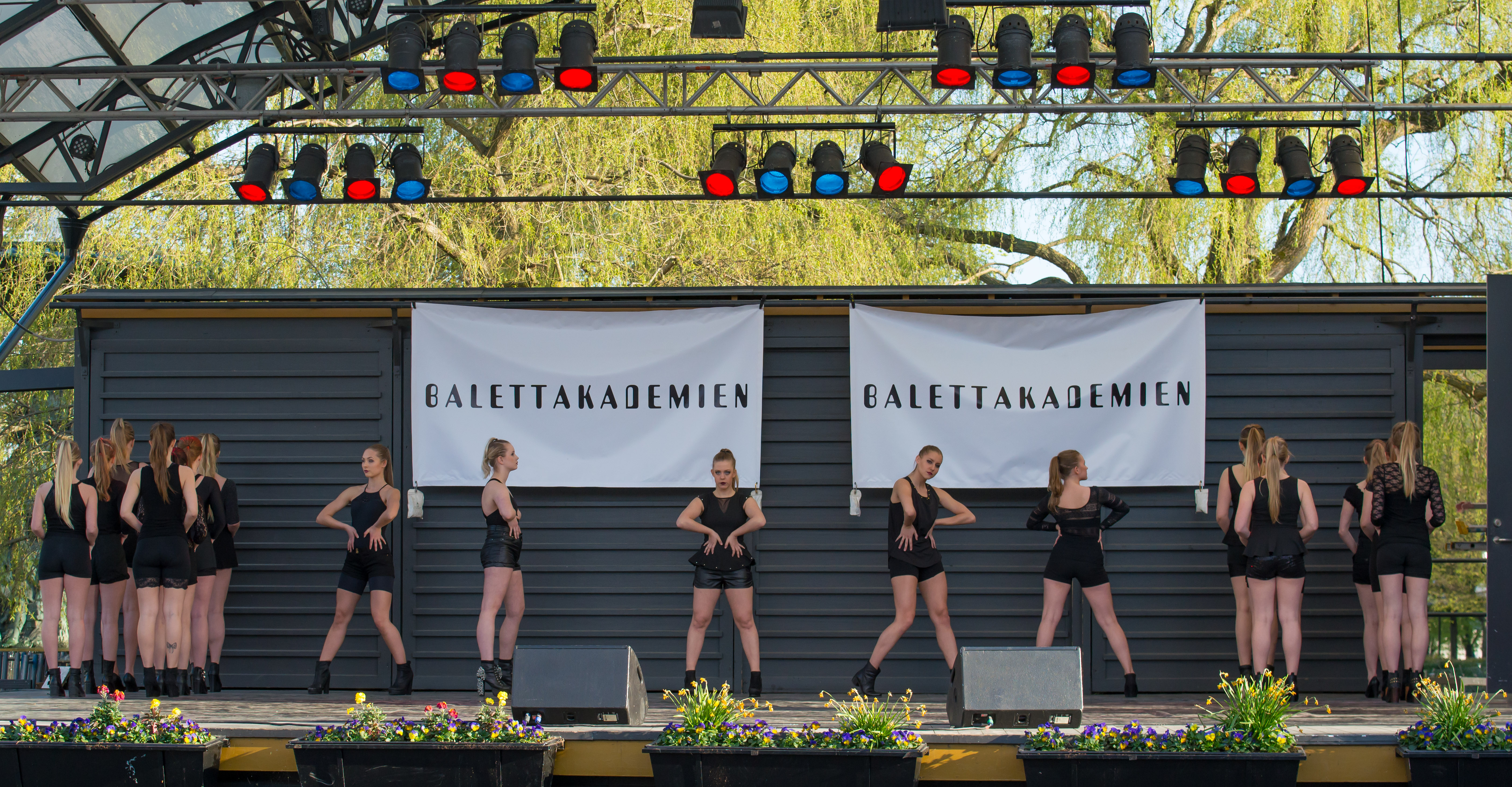 Föreställning med elever från Balettakademien på Balettakademiens Dag i Kungsträdgården den 6 maj 2015.